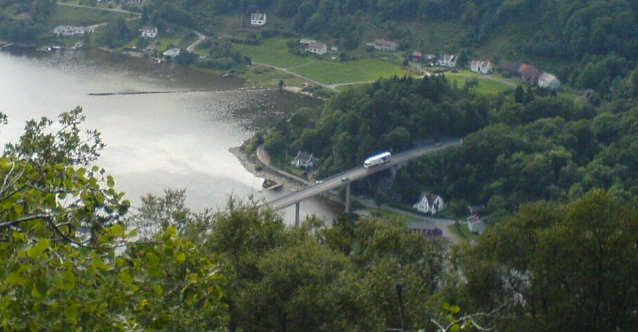 Feda bru Tatt fra nærheten av Orresteinen